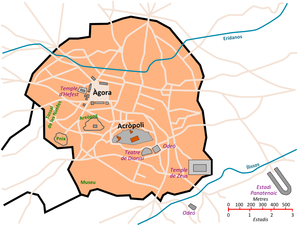 Plànol d'Atenes en època clàssica, al voltant del 430 a. C.